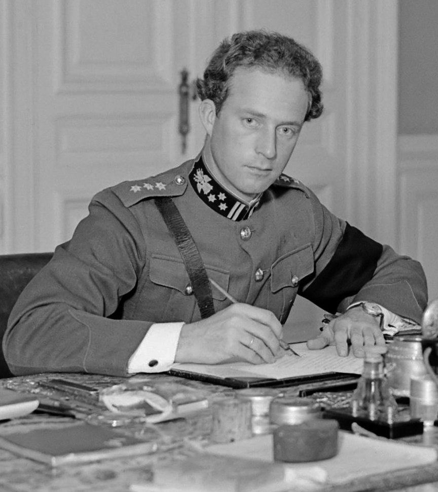 Koning Leopold III achter zijn bureau in het paleis te Laken 1934